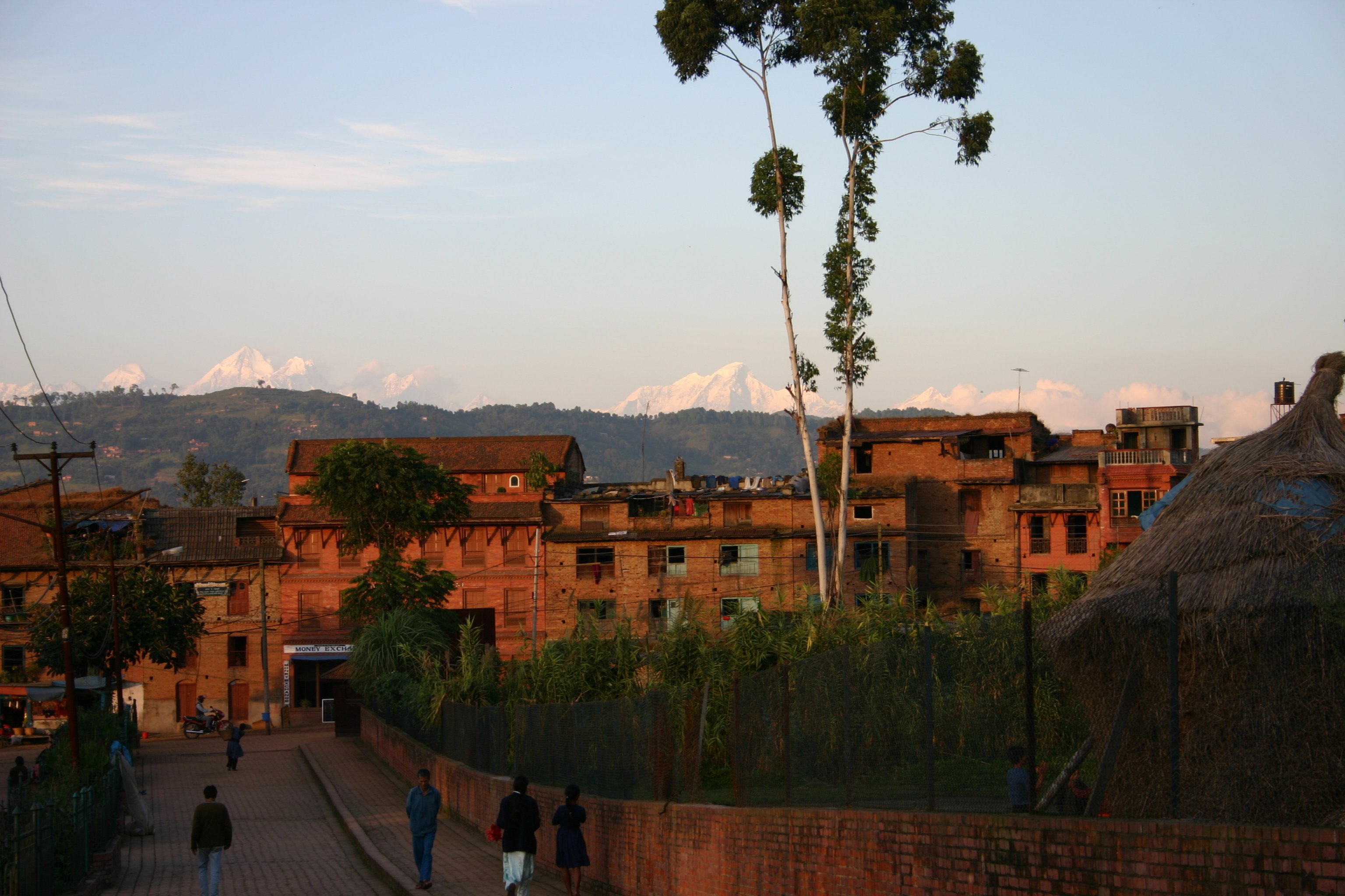 Bhaktapur